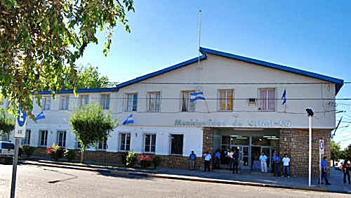 cutral muni